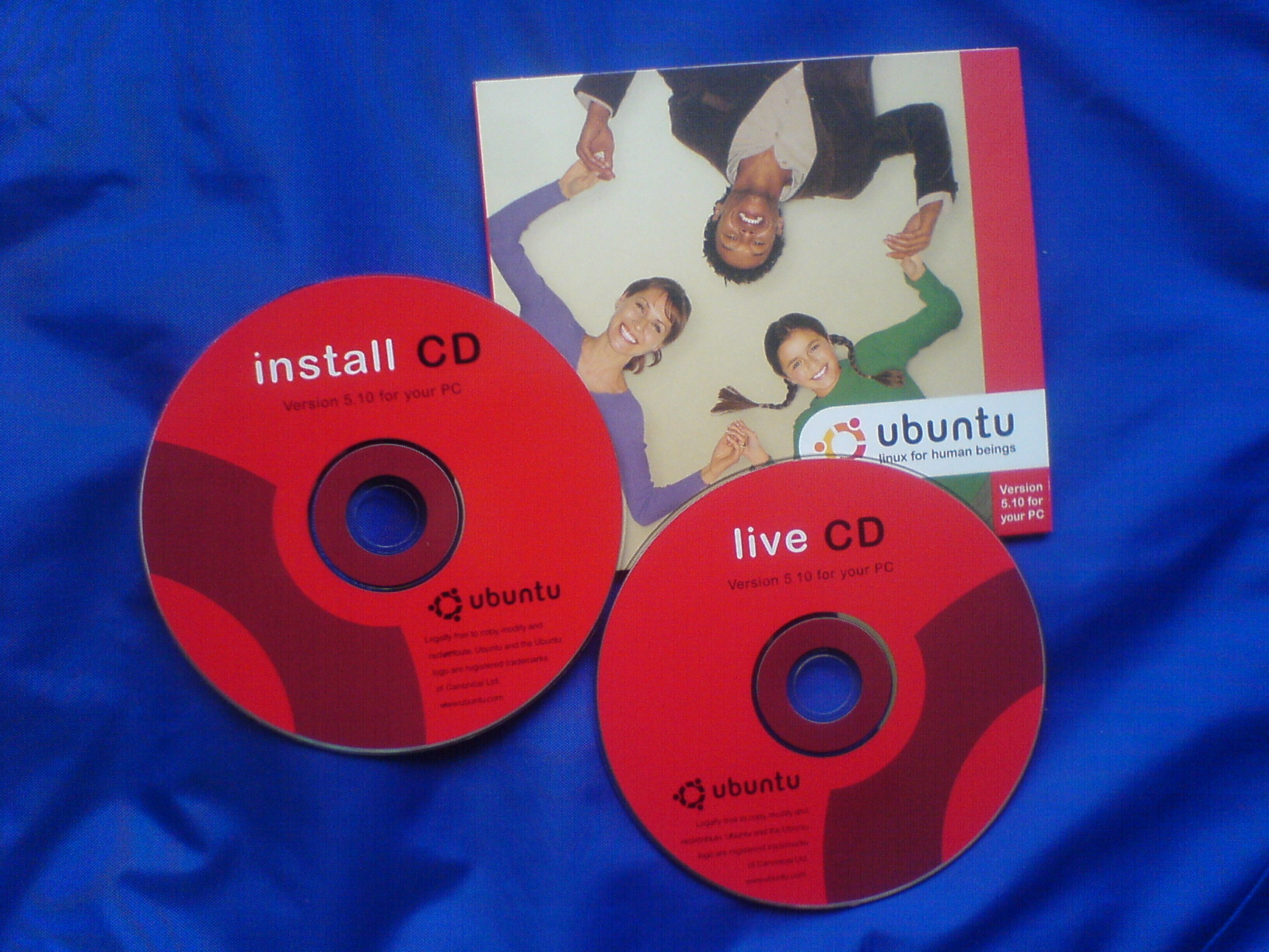 Zdjęcie płyty Ubuntu 5.10